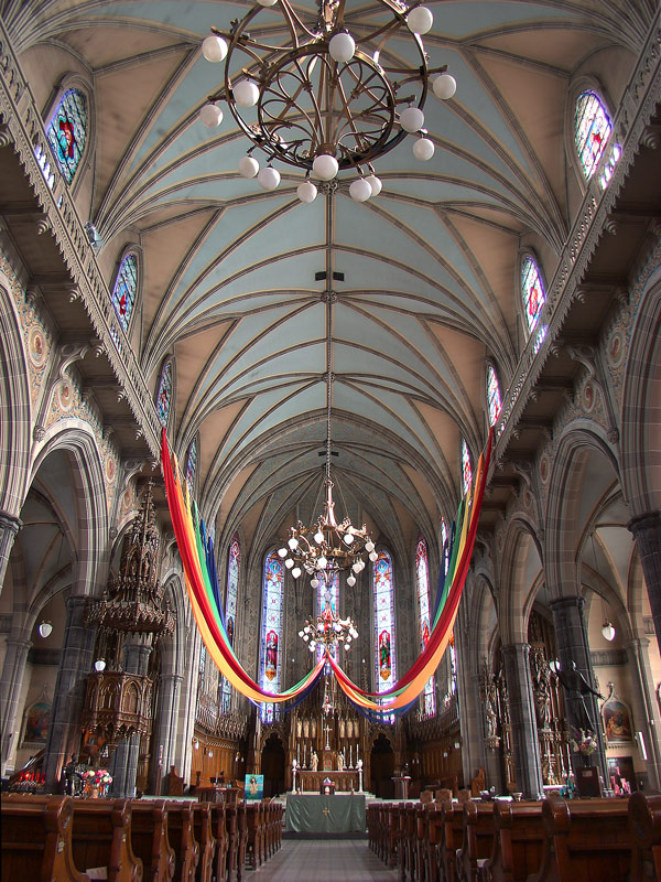 Église Saint-Pierre-Apôtre, Montréal, Québec, Canada.